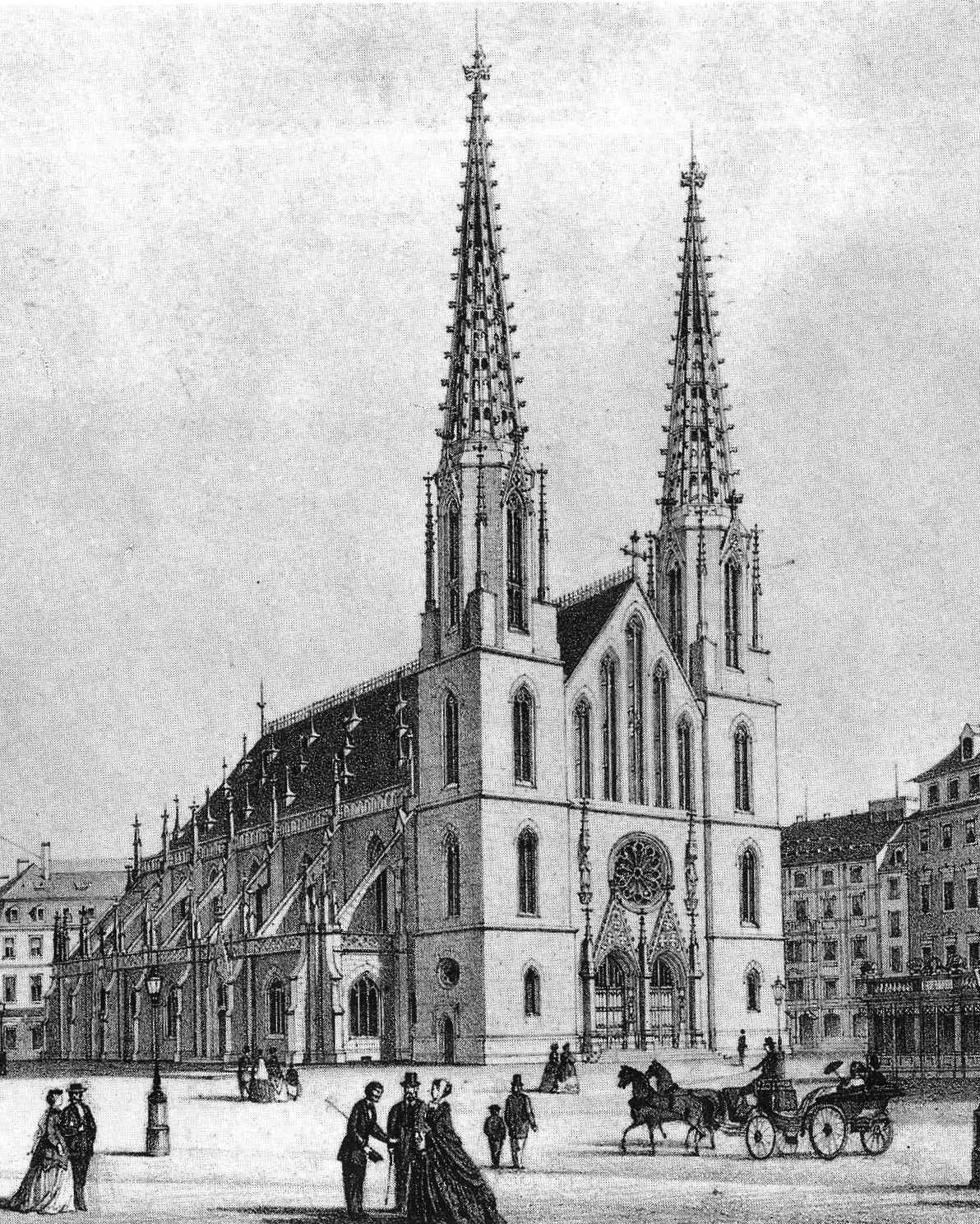 Dresden Sophienkirche Lithographie